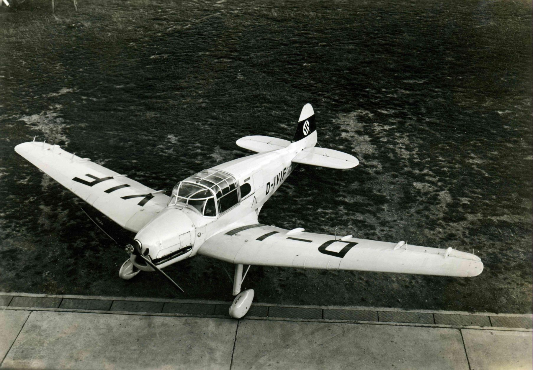 Foto der Fieseler Fi 97, ein viersitziges Sport- und Reiseflugzeug als freitragender Tiefdecker in Gemischtbauweise ausgeführt. Flügel mit Nasen-Slot und Fieseler ‚Rollflügel’ ausgestattet. Höhen- und Seitenruder mit Leichtmetallgerippe. Verschiebbares Kabinendach. Motor: Argus As 17 A, 225 PS oder Hirth HM 8 U, 250 PS. Entwickelt und gebaut bei dem Fieseler Flugzeugbau Kassel.